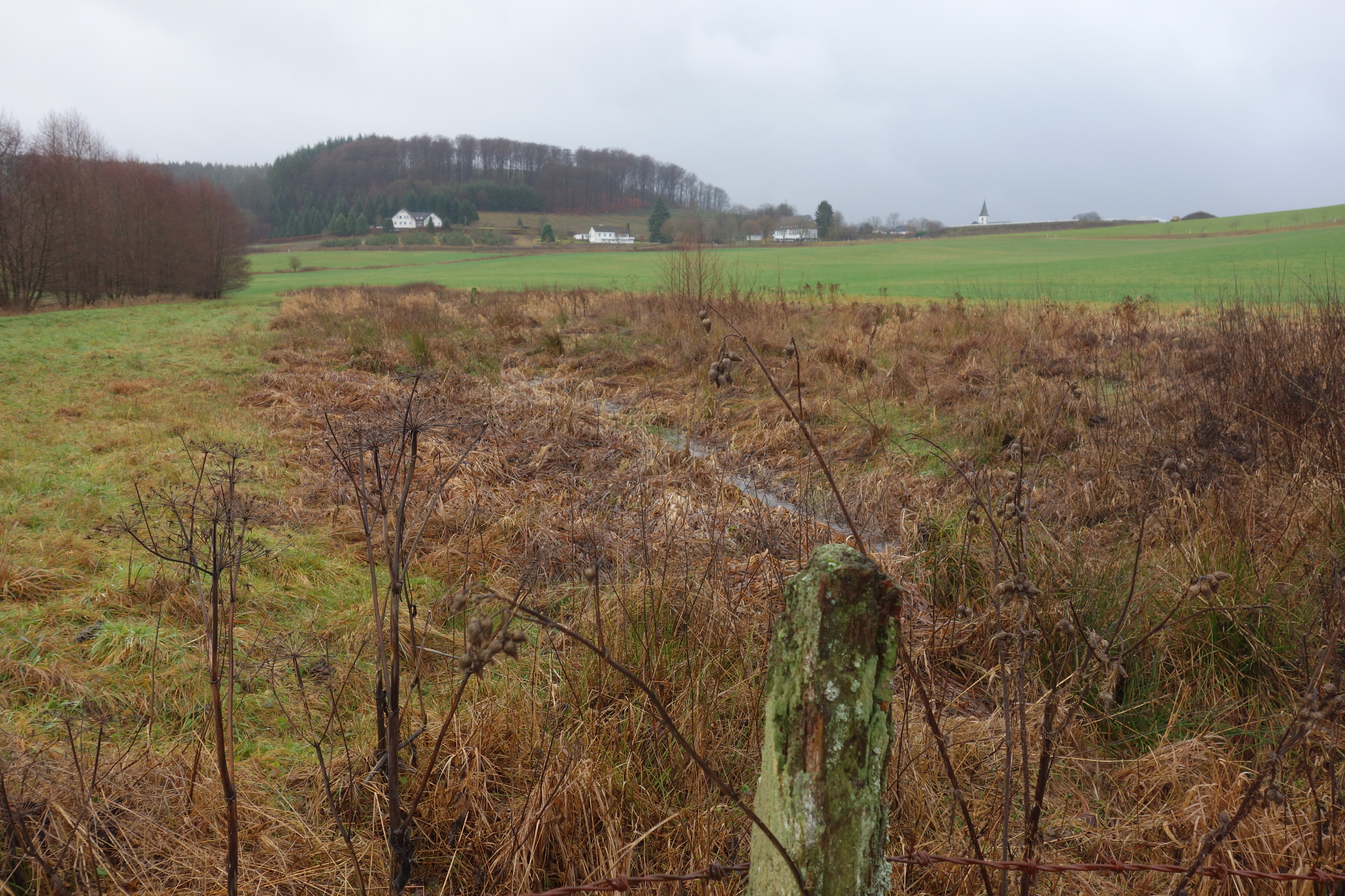 Naturschutzgebiet Feuchtgrünland am Hengsbecker Bach im Vordergrund. Foto von Mitte des NSG in Richtung Süden aufgenommen.